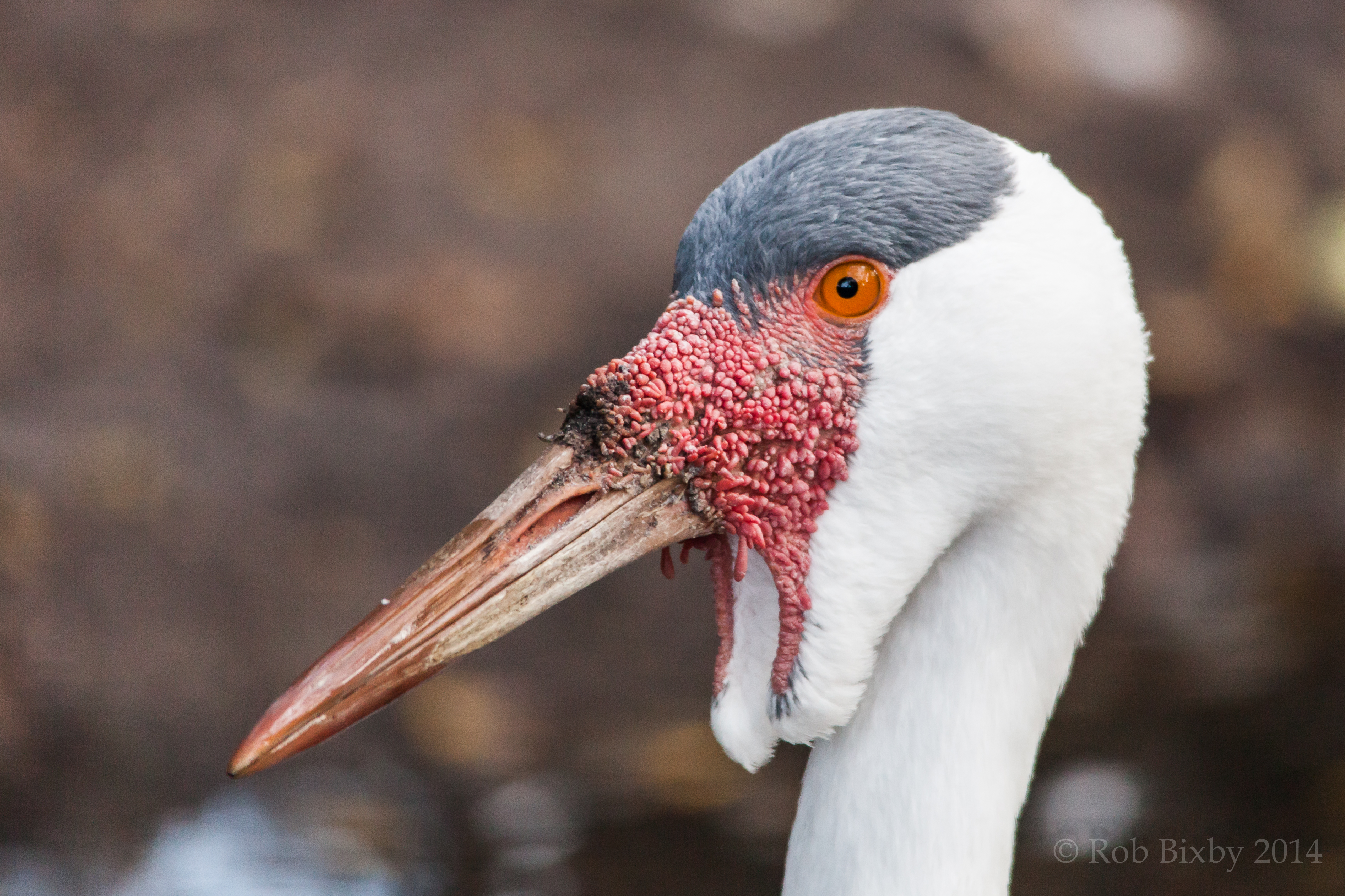 JaxZoo_12-19-14-2709